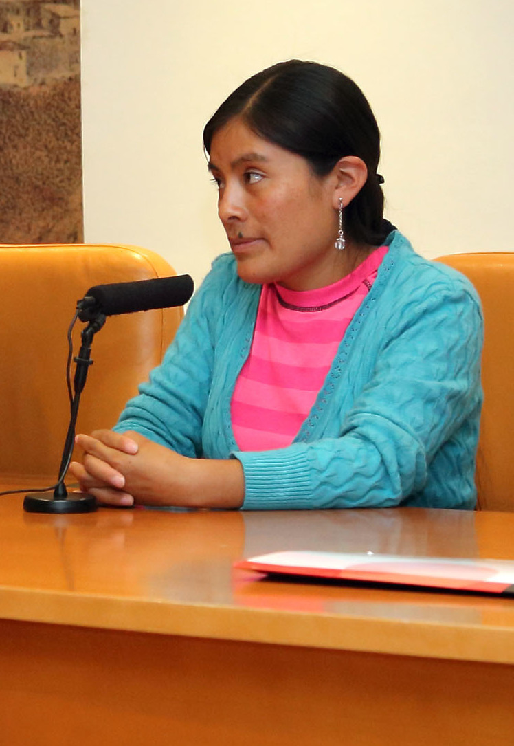 Toledo, 9-03-2016. Nélida Ayay - La directora del Instituto de la Mujer, Araceli Martínez, durante la conferencia y debate con la activista peruana Nélida Ayay en el marco de la proyección del documental “Hija de la Laguna” organizado por la ONG AIETI en el Salón de actos de la Biblioteca regional de Castilla-La Mancha, en la que también han participado la concejala de Igualdad del Ayuntamiento de Toledo, Inés Sandoval (i) y la presidenta de dicha ONG, Angélica Matías (d). (Foto: Álvaro Ruiz // JCCM)